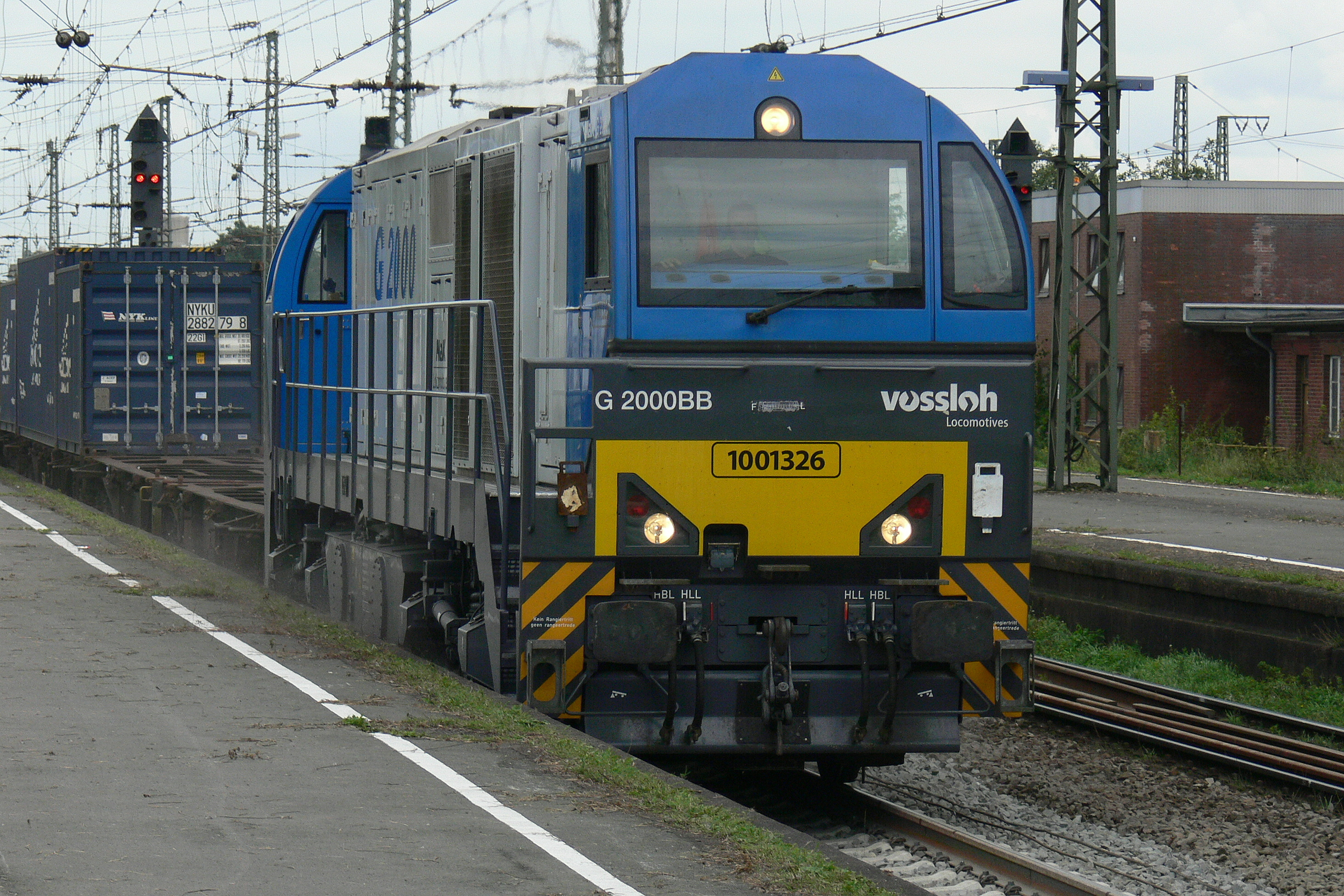 Vosslog G 2000 BB mit asymmetrischem Führerhaus in Moers